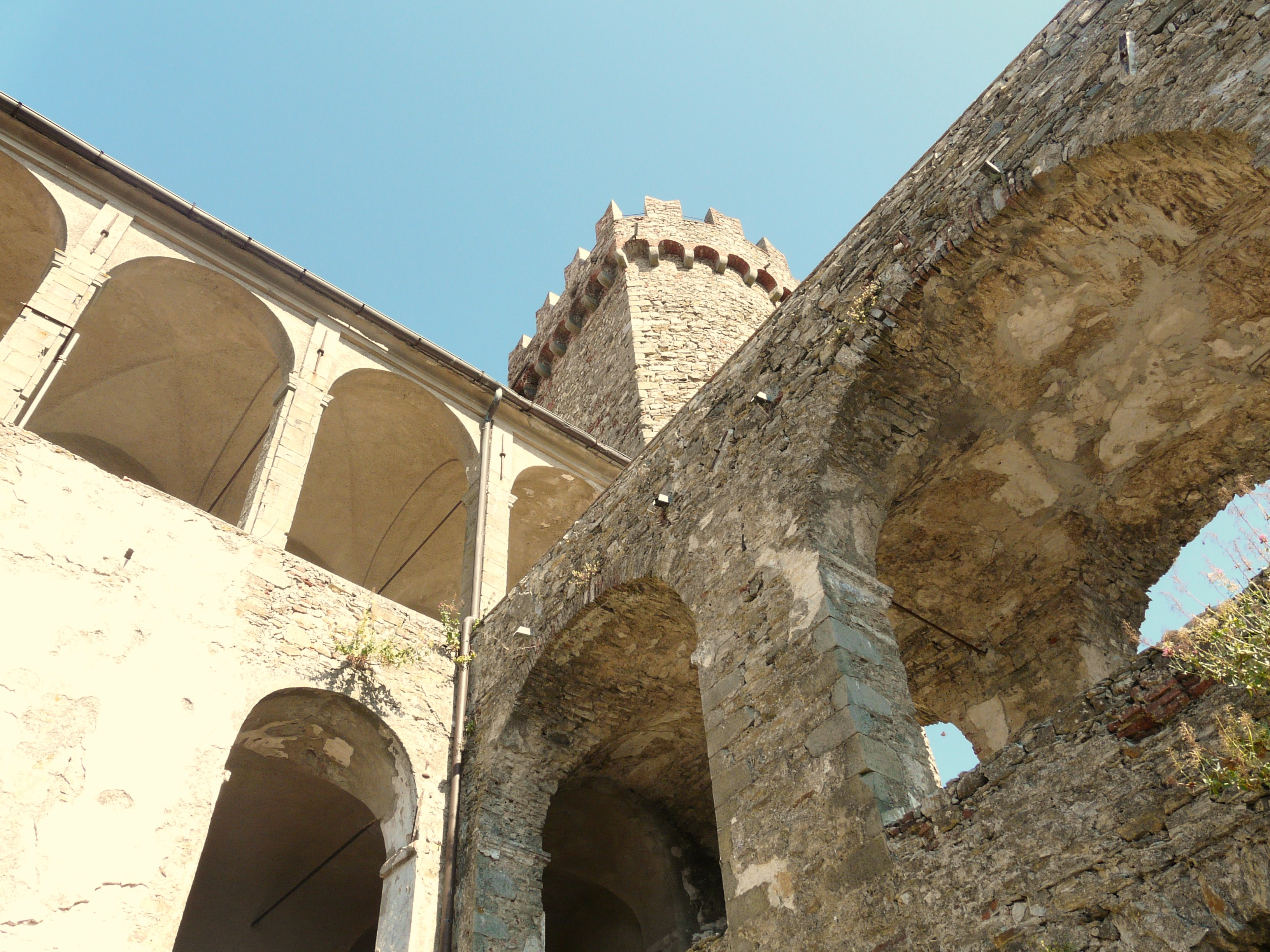 Castello Malaspina, Fosdinovo, Toscana, Italia